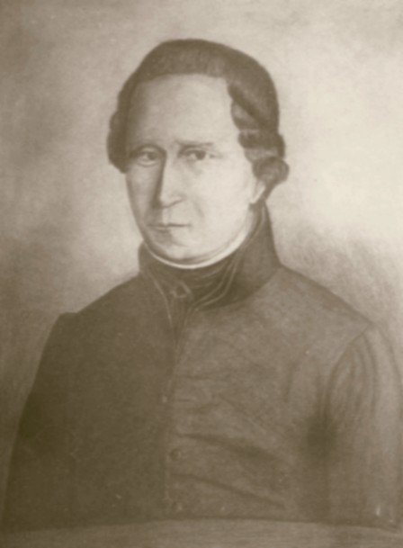 Porträt des Aachener Heimatforschers Christian Quix